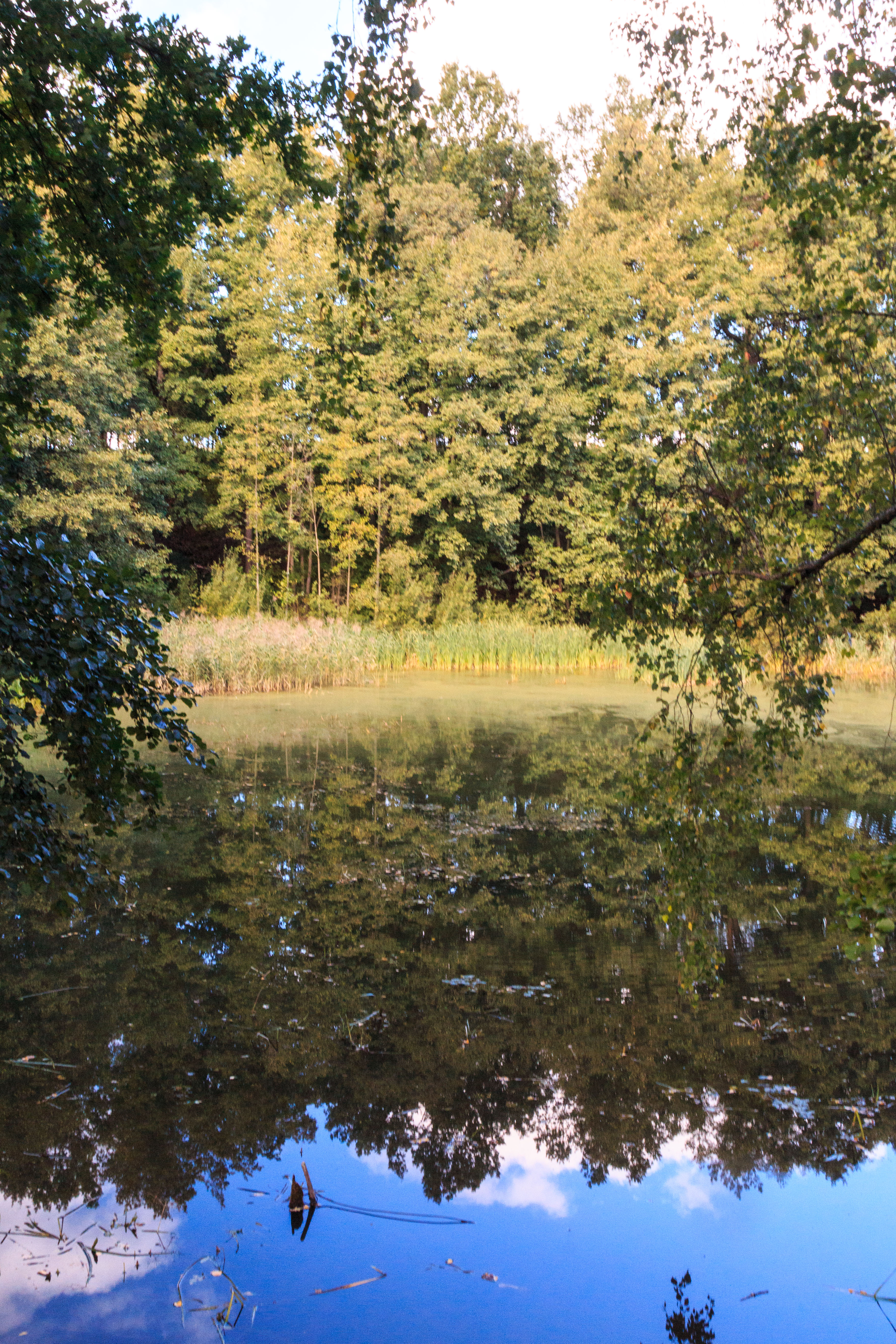 Rybník Očko ve Sloupu v Čechách Project: Vodstvo.